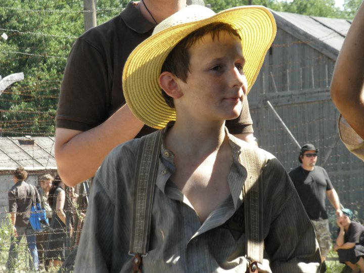 Oliver Cywie dans le rôle de Simon Zygler dans le film "La rafle"